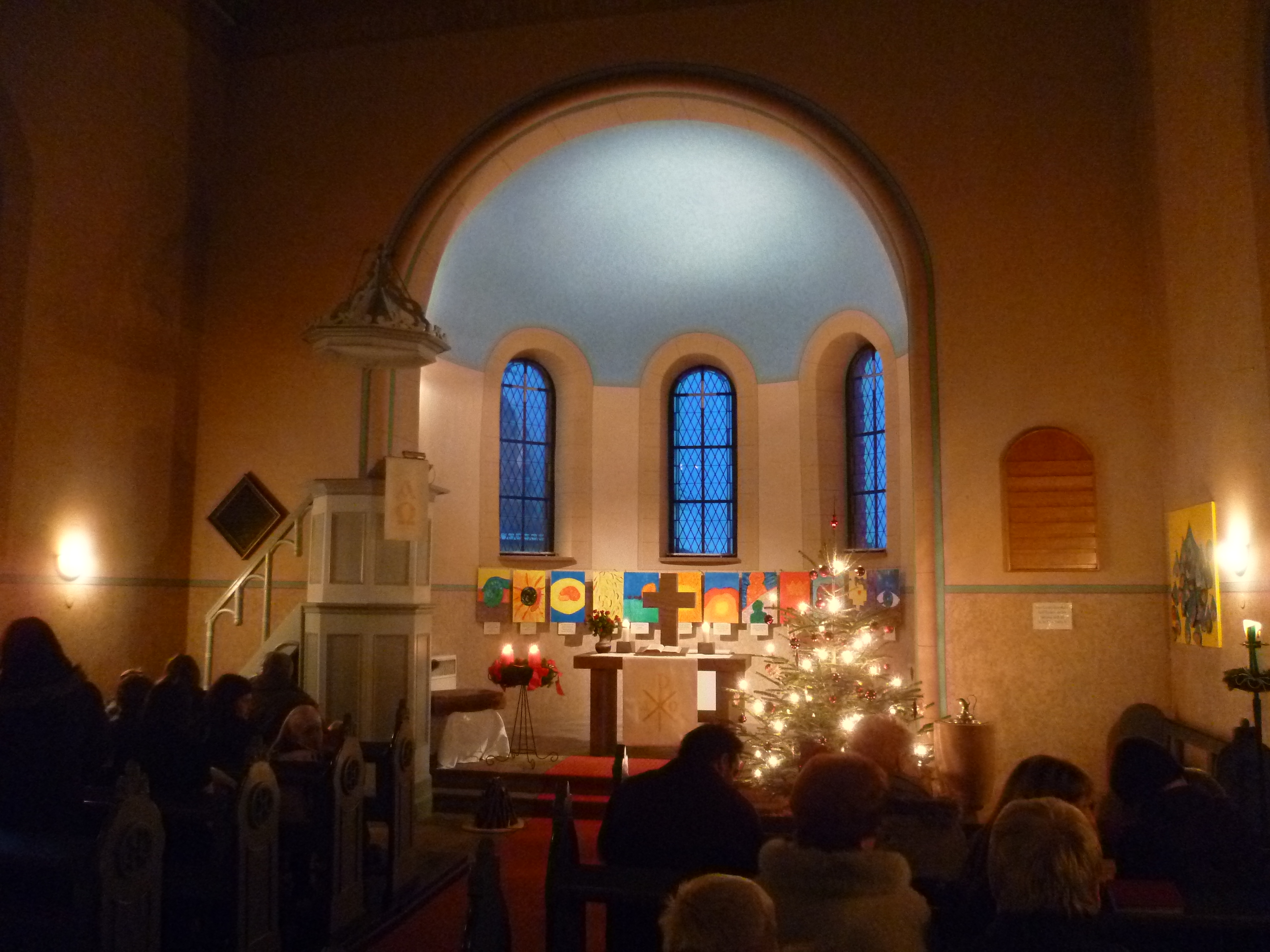 Das Kircheninnere der evangelischen Kirche Görsroth an Heiligabend 2010